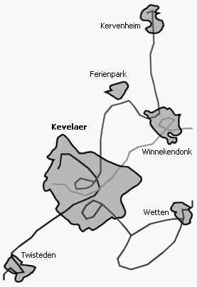 Routen der vier Bürgerbuslinien Kevelaers